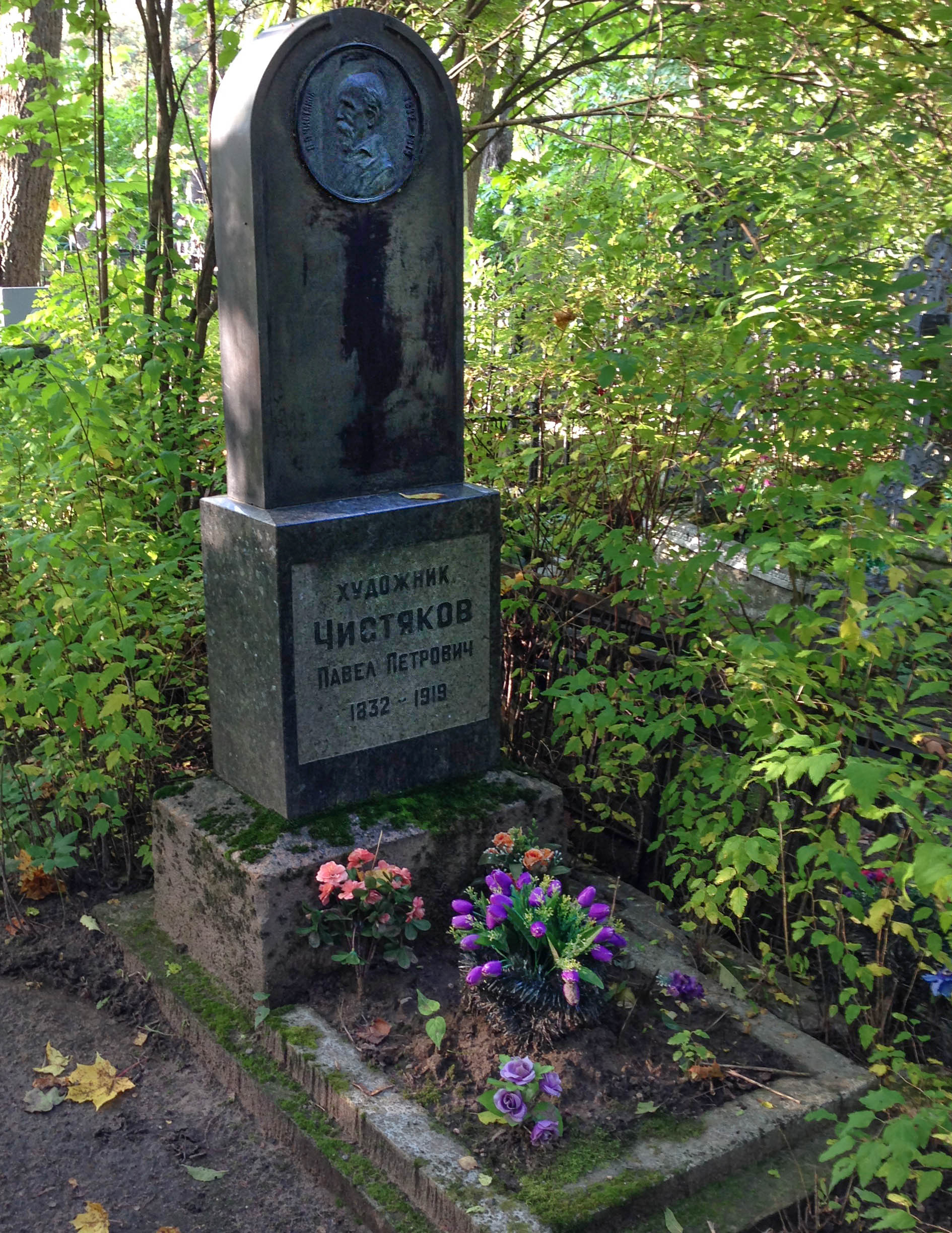 Могила и надгробие художника и педагога П. П. Чистякова на Казанском кладбище в г. Пушкин